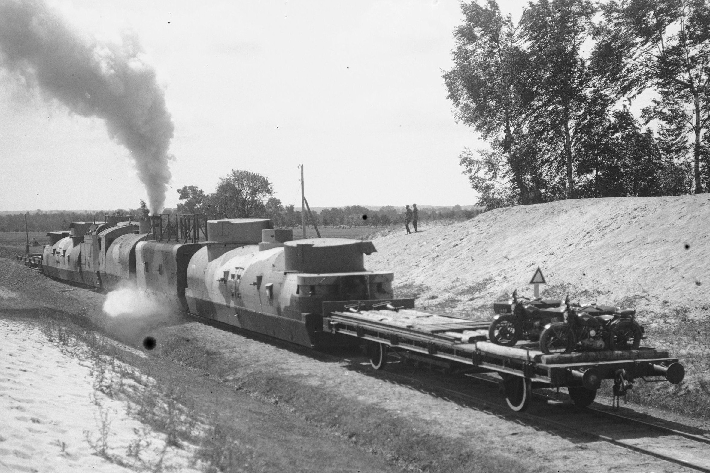 Pociąg pancerny "Danuta" podczas ćwiczeń.